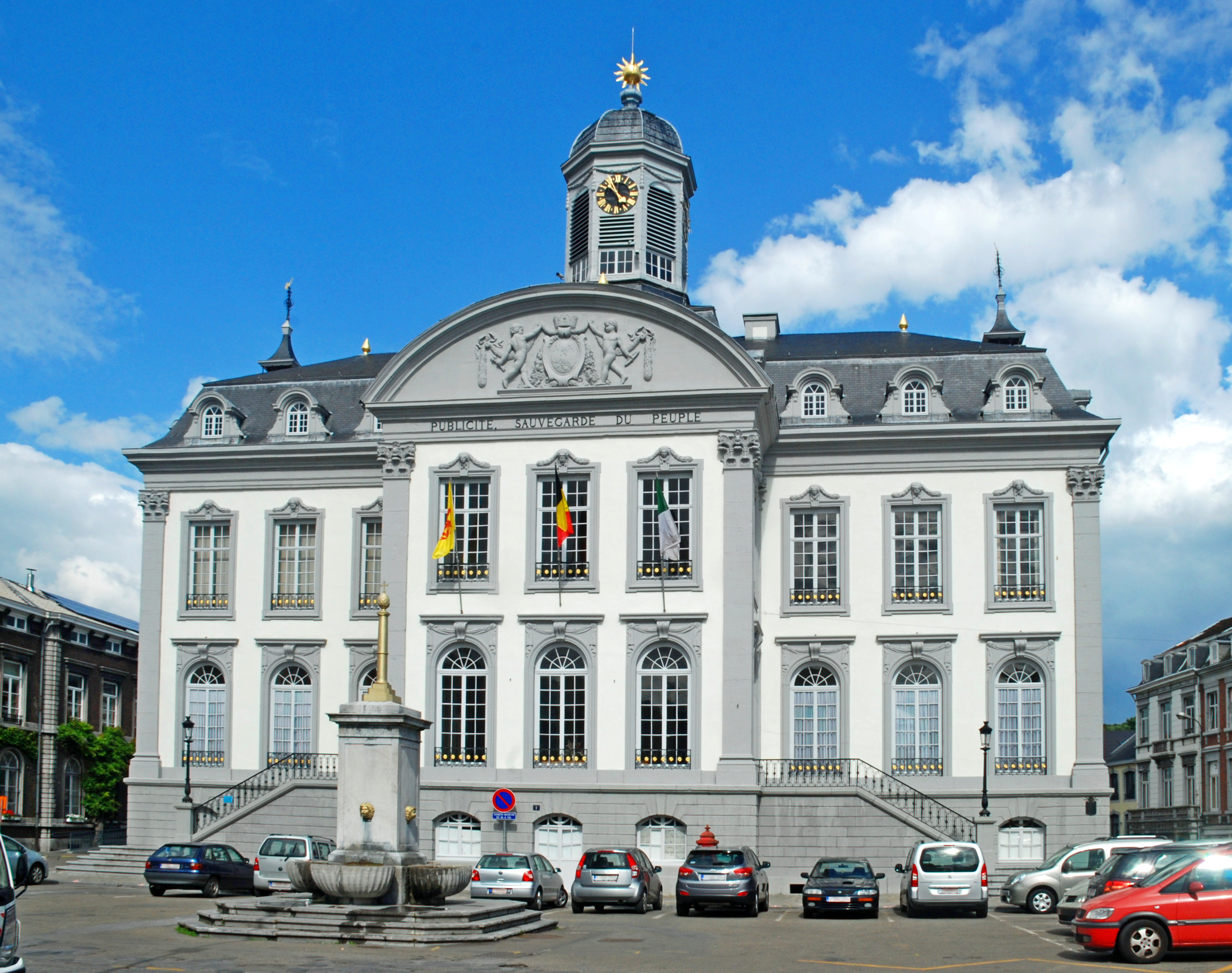 Belgique - Province de Liège - Hôtel de ville de Verviers